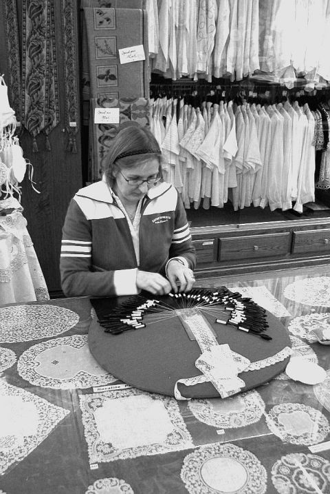 Kantkloster in Brugge - eigen foto